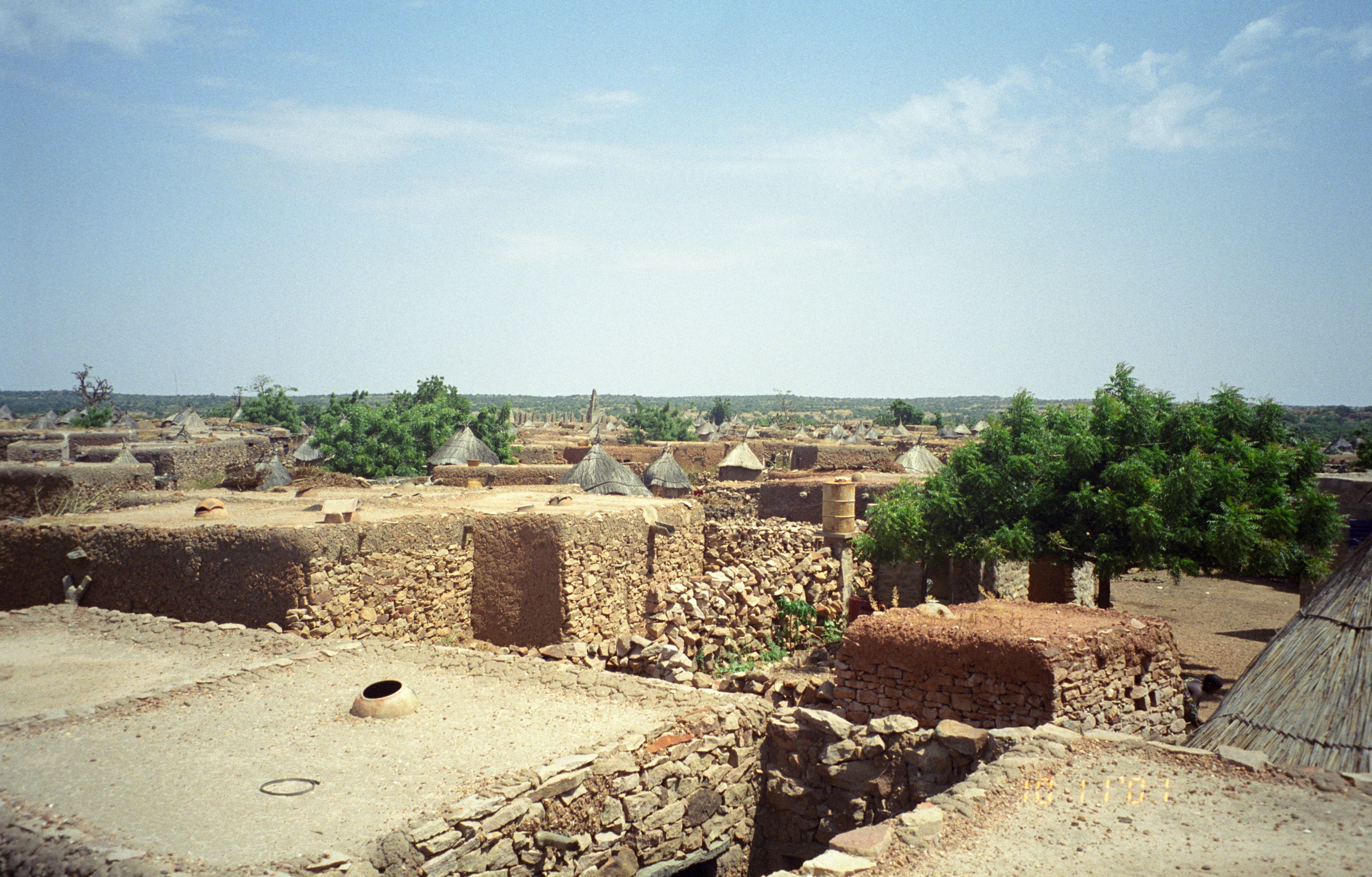 Djiguibombo, Mopti Region, Mali